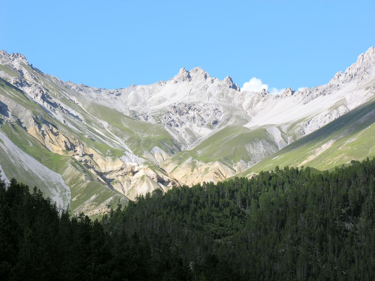 Switzerland, Graubünden, Swiss National Park